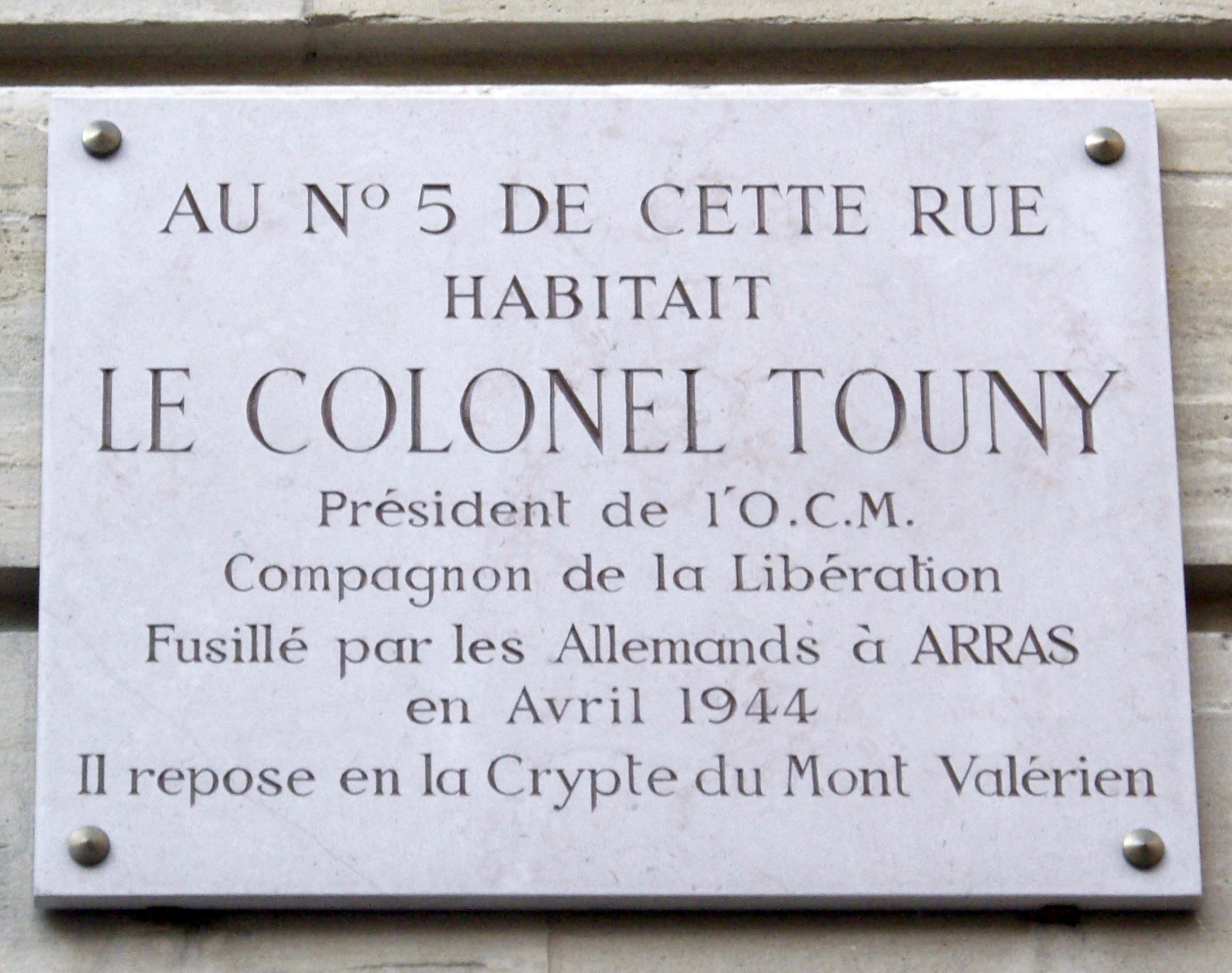 Plaque commémorative, 1 rue du Général-Langlois, Paris 16e. « Au n° 5 de cette rue habitait le colonel Touny, président de l'OCM, Compagnon de la Libération, fusillé par les Allemands à Arras en avril 1944. Il repose en la crypte du mont Valérien. »